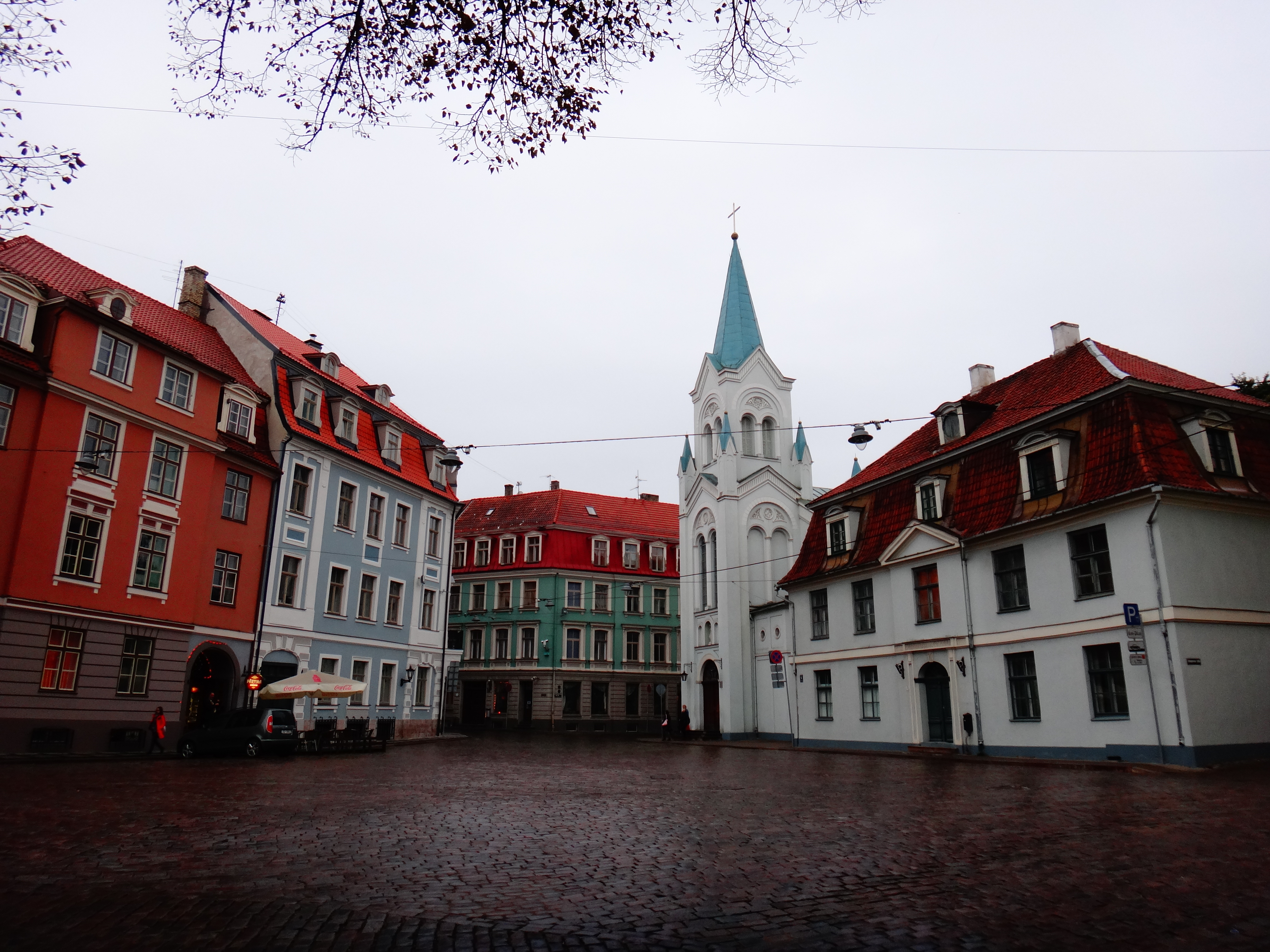 Vecrīga, Central District, Riga, LV-1050, Latvia